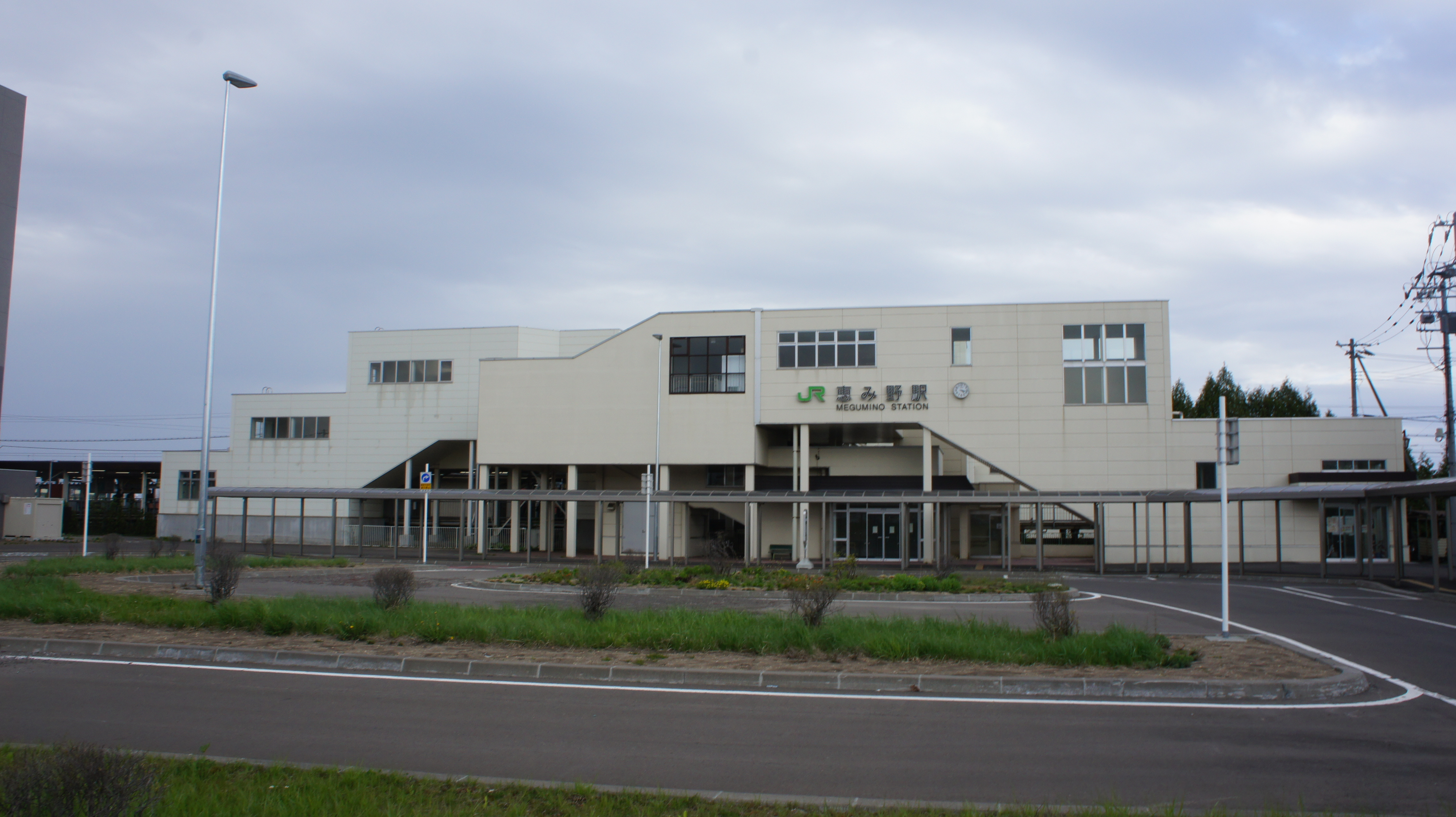 JR千歳線・恵み野駅の駅舎（西口） Sony NEX-3